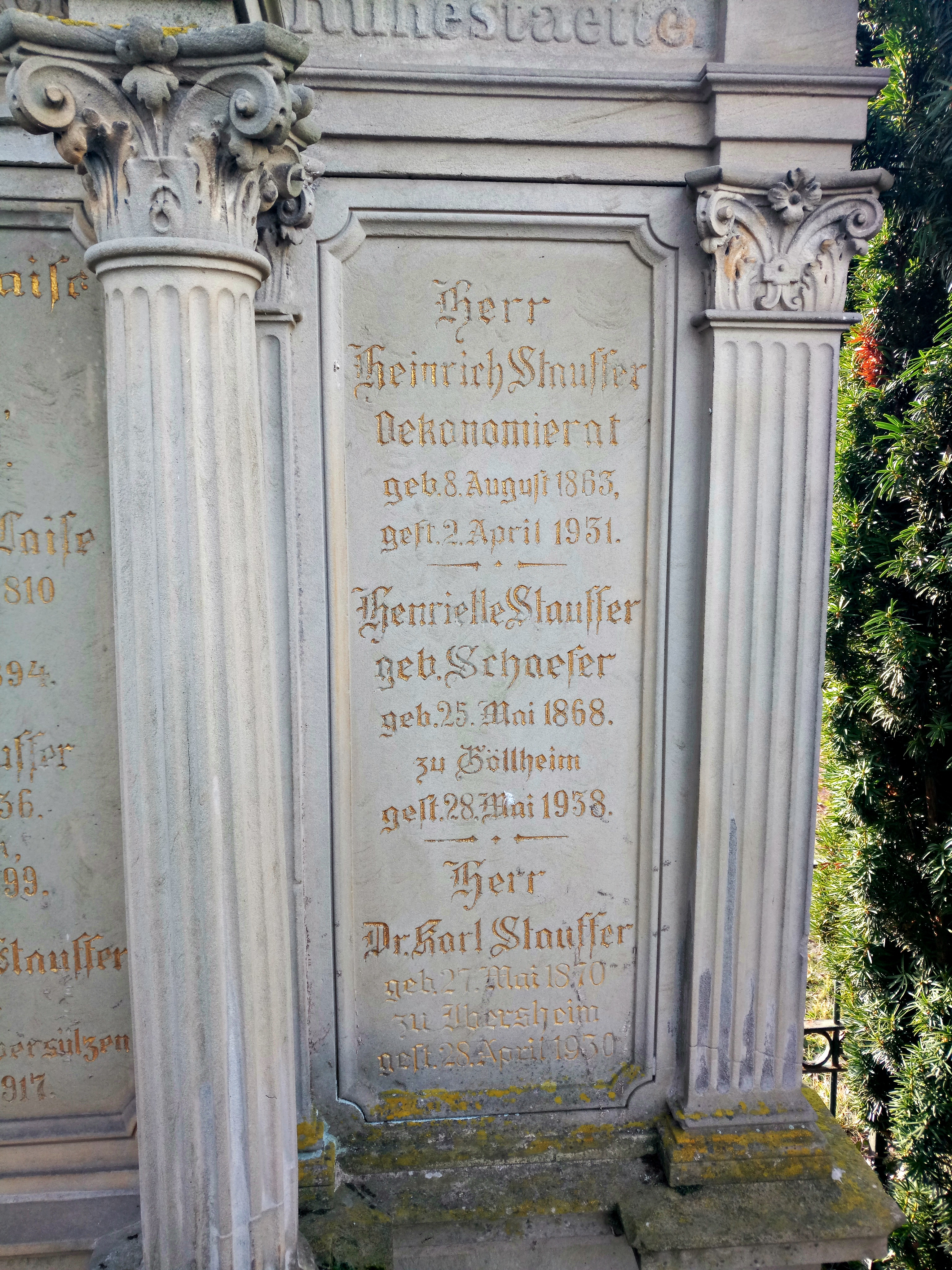 Grabstein Reichstagsabgeordneter Heinrich Stauffer, Friedhof Obersülzen